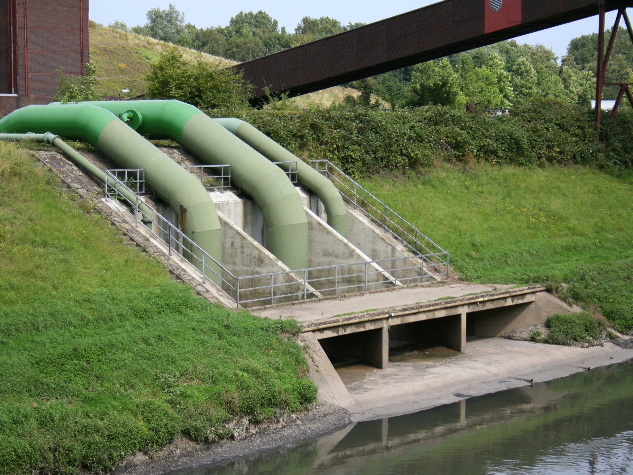 Emscher im Nordsternpark in Gelsenkirchen